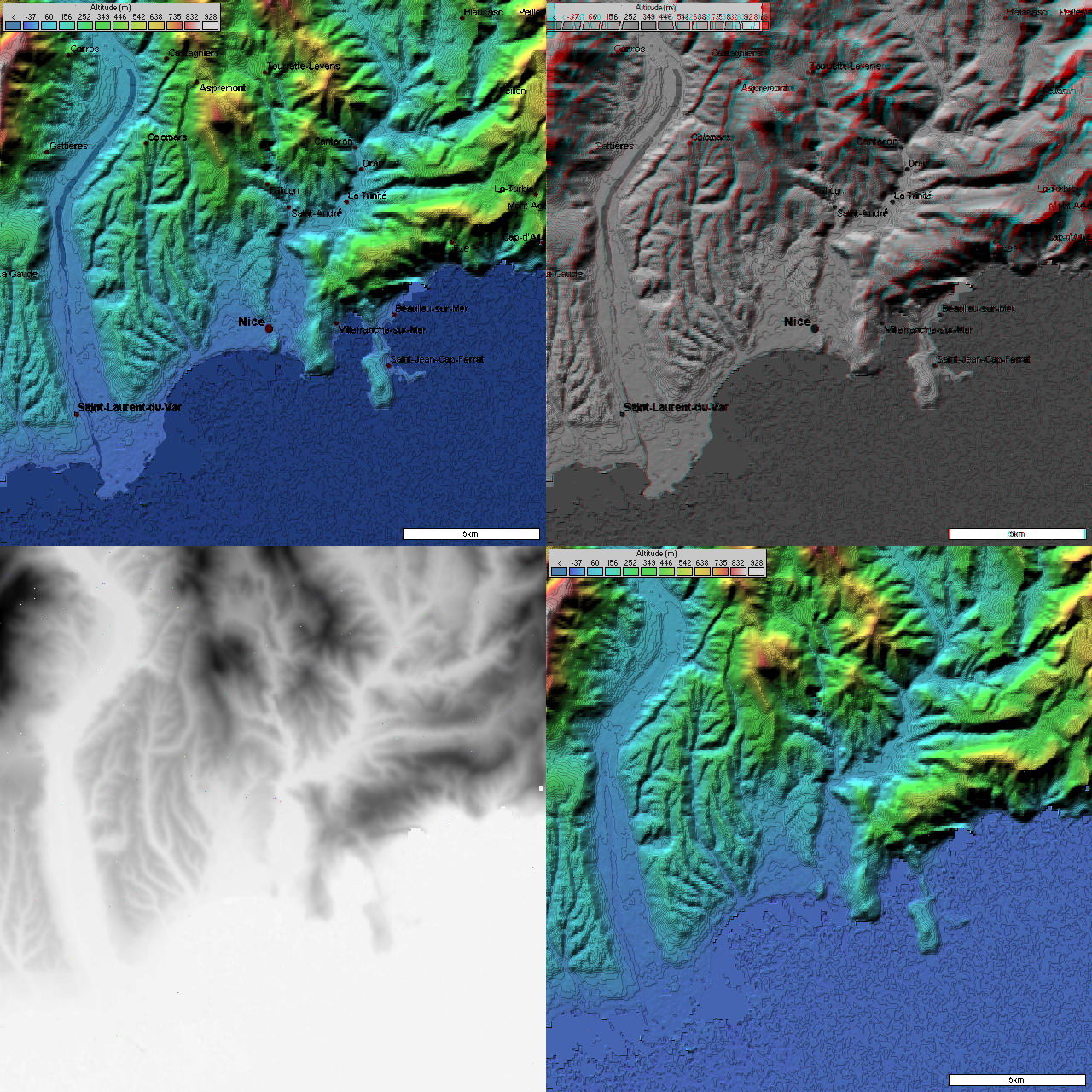 Topographie de Nice 4 images topographique (20 km de coté) de Nice prisent par la mission SRTM. Image topographique + position des villes image topographique en relief + position des villes image topographique en niveau de gris (utile pour displacement map dans les logiciel 3D) Image topographique sans les villes Générée par le logiciel Radiomobile à partir des données domaine publique de la mission SRTM de la NASA.